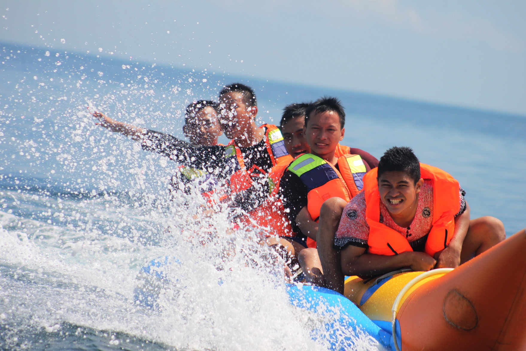 Banana Boat Beras Basah 2